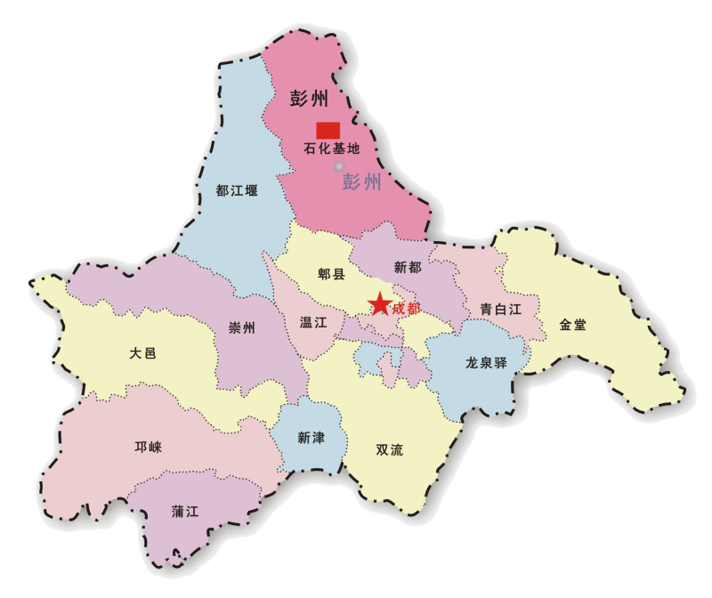 彭州石化区方位图